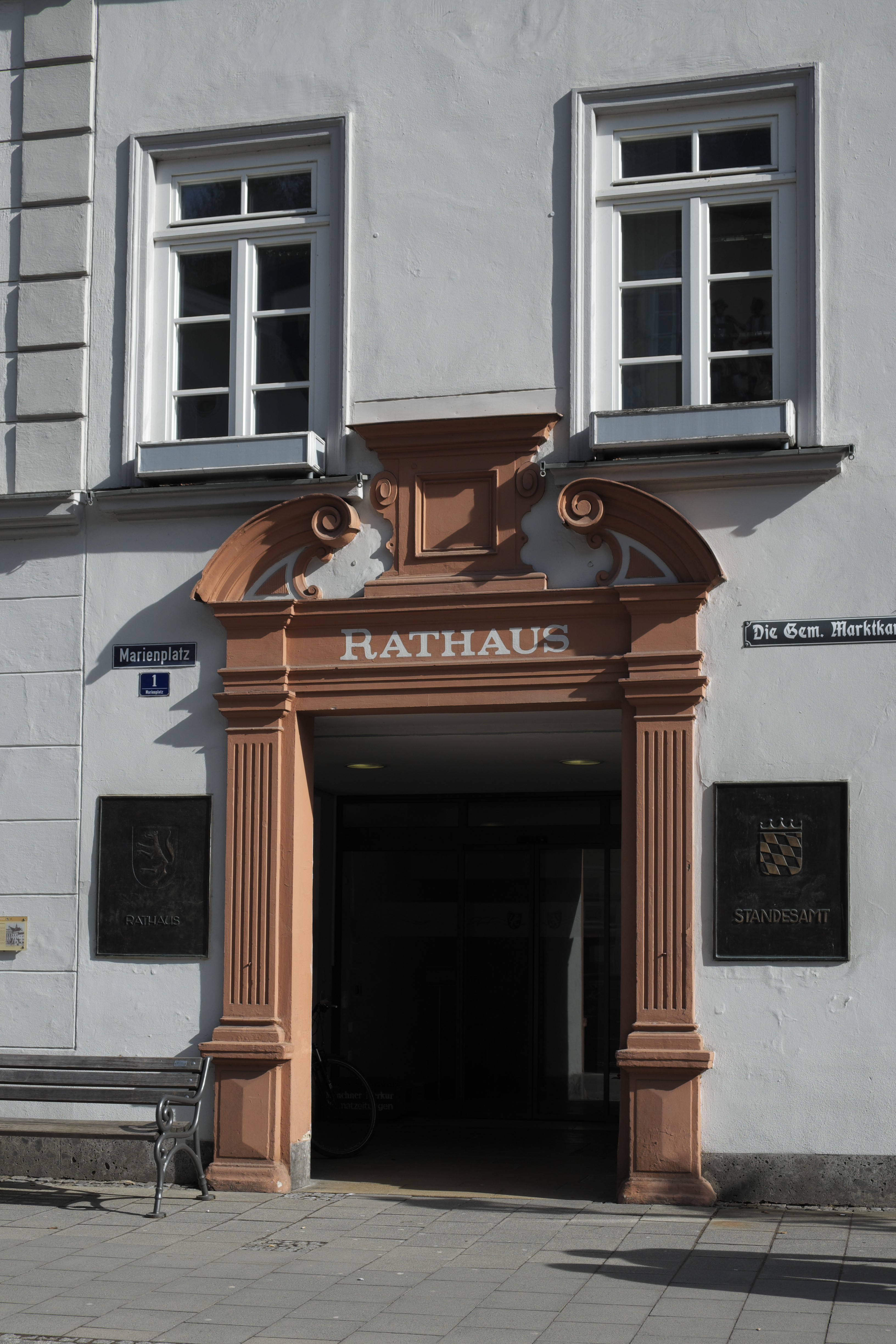 Rathaus in Wolfratshausen im Landkreis Bad Tölz-Wolfratshausen (Bayern/Deutschland), Eingang mit gesprengtem Giebel